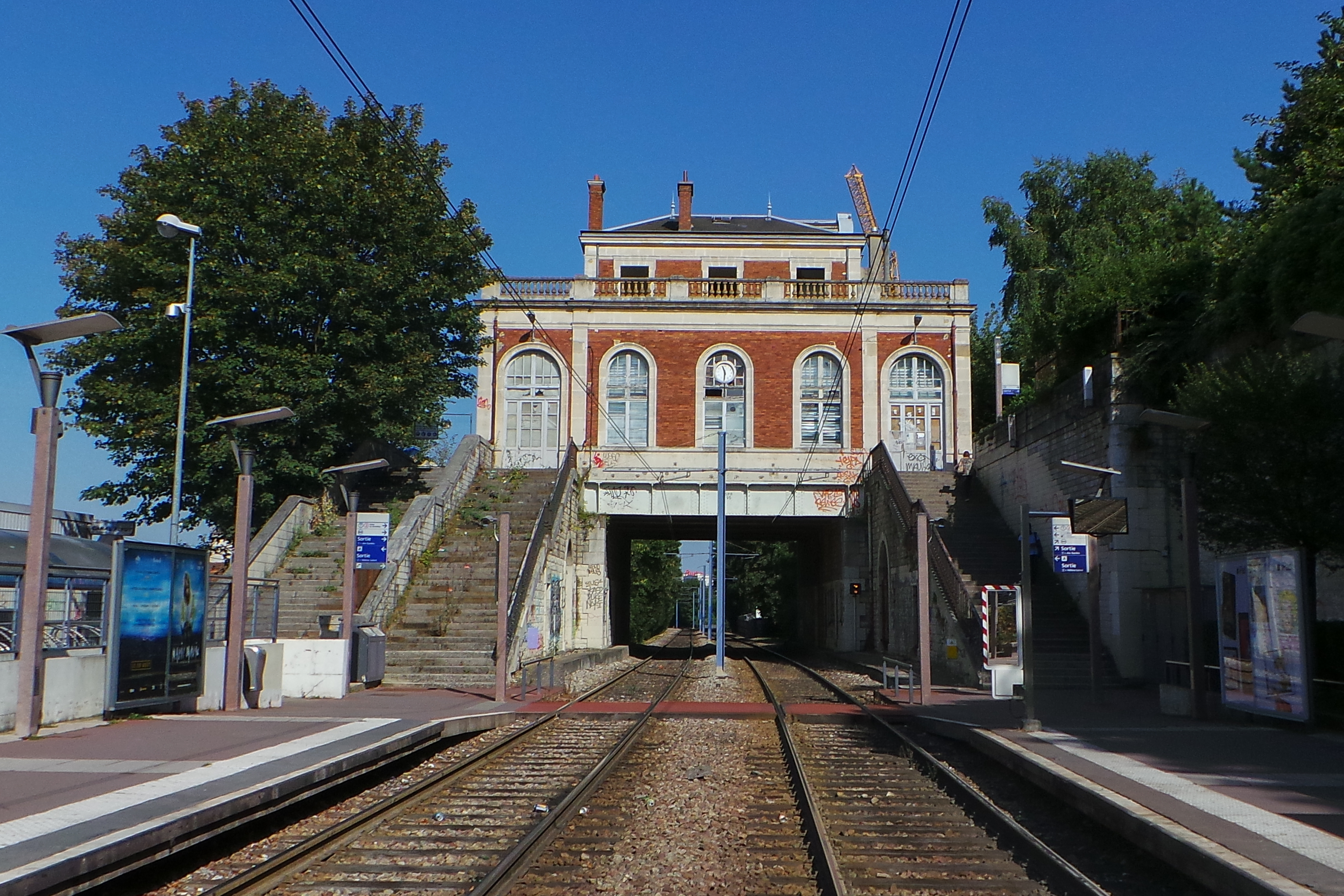 Ancienne gare Bas-Meudon, Meudon, Hauts-de-Seine, France